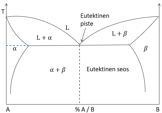 Eutektisen systeemin faasidiagrammi